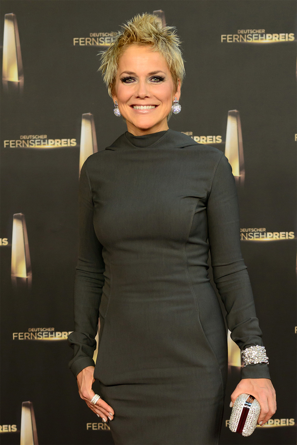 Ankunft von Inka Bause auf dem 16. Deutschen Fernsehpreis am 2. Oktober 2014 in Köln.